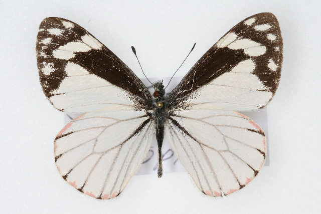 Neophasia terlooii male